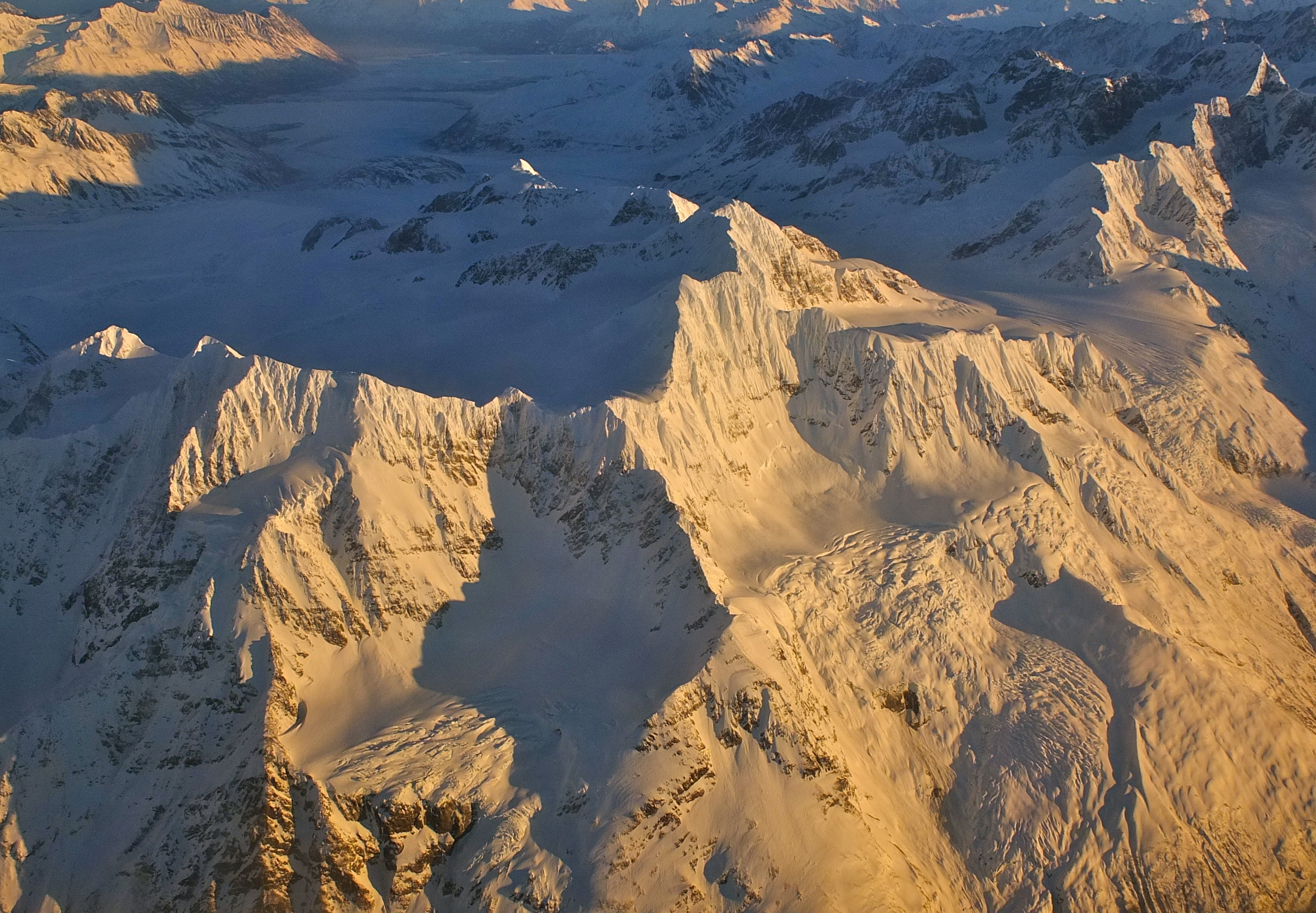 Chucach Range